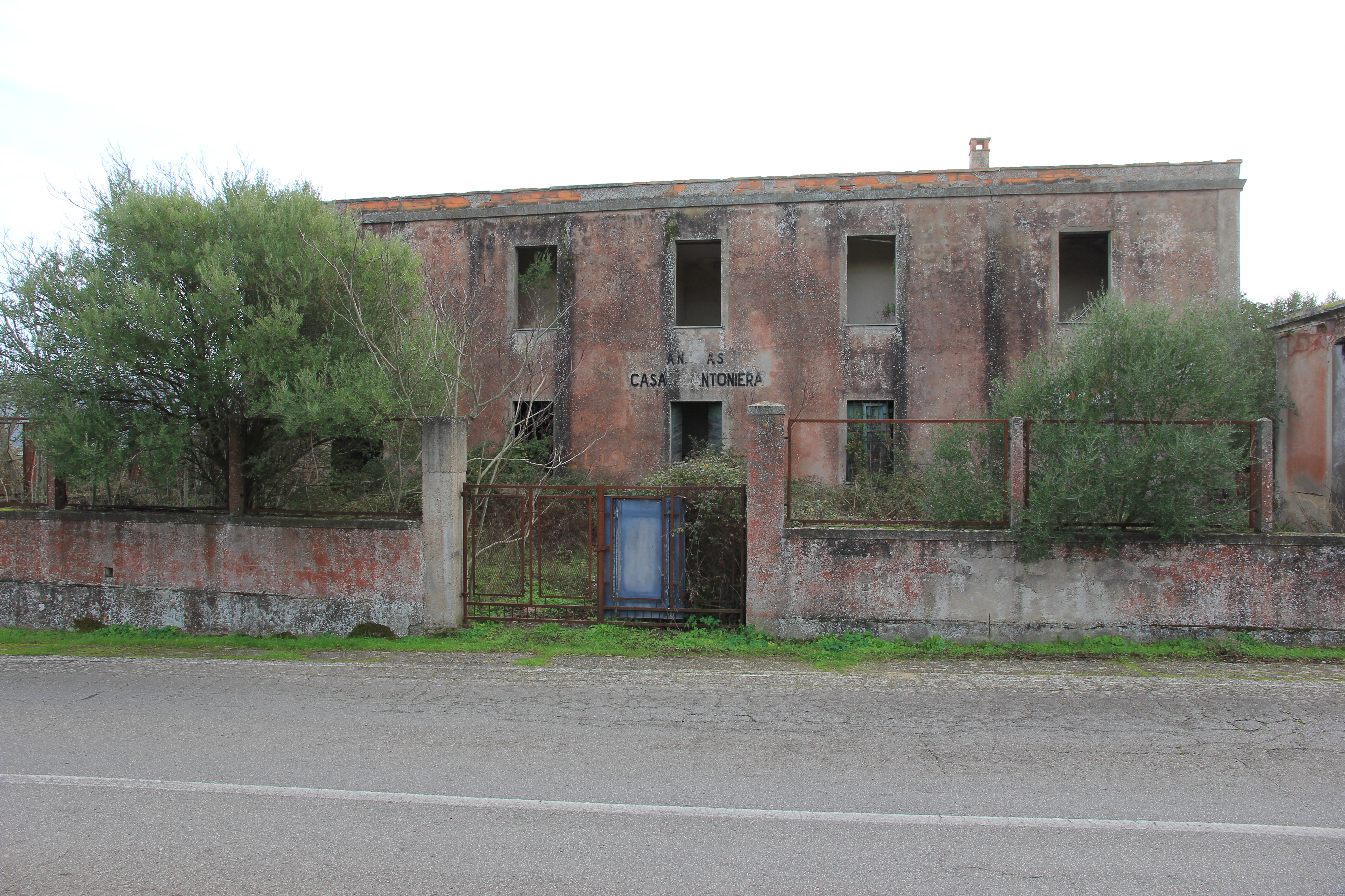 Berchidda - Casa cantoniera di Tucconi